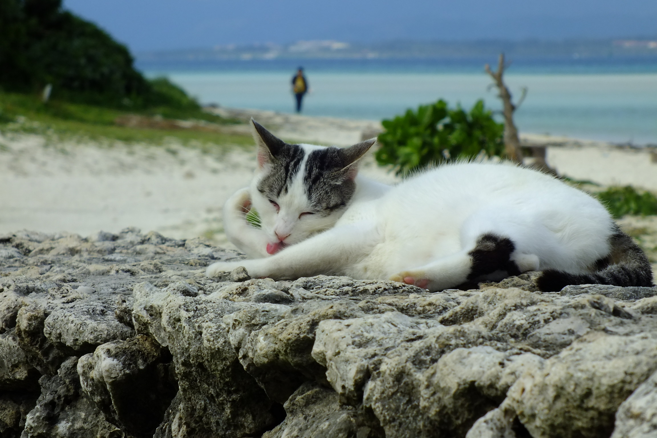 2015-12-20 Kondoi Beach Taketomi-Island,Okinawa コンドイ浜（沖縄県八重山郡竹富町竹富）の猫